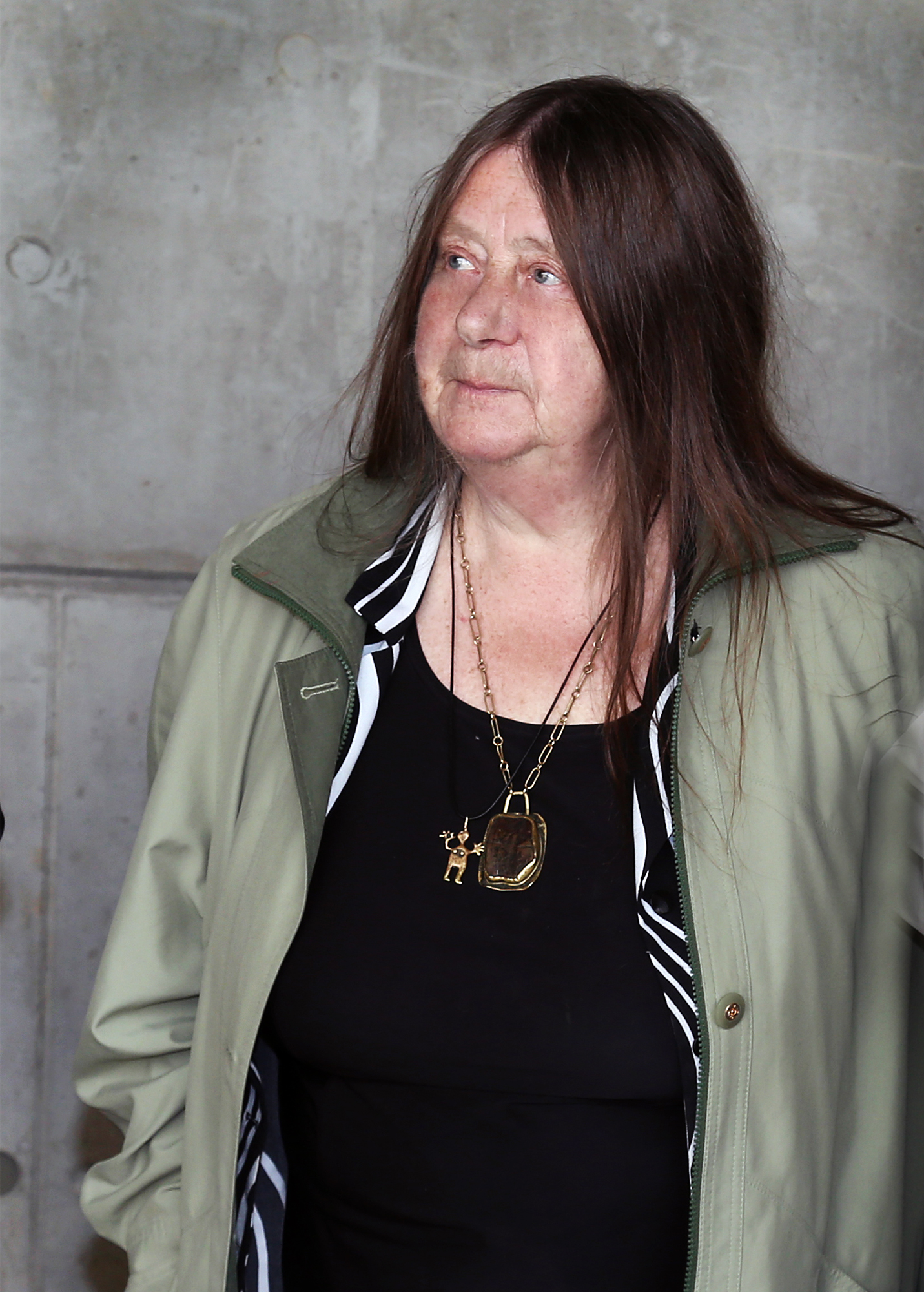 Tiina Mägi, ajakirjanik, telerežissöör ja liikumise Kodulinn algataja 2016